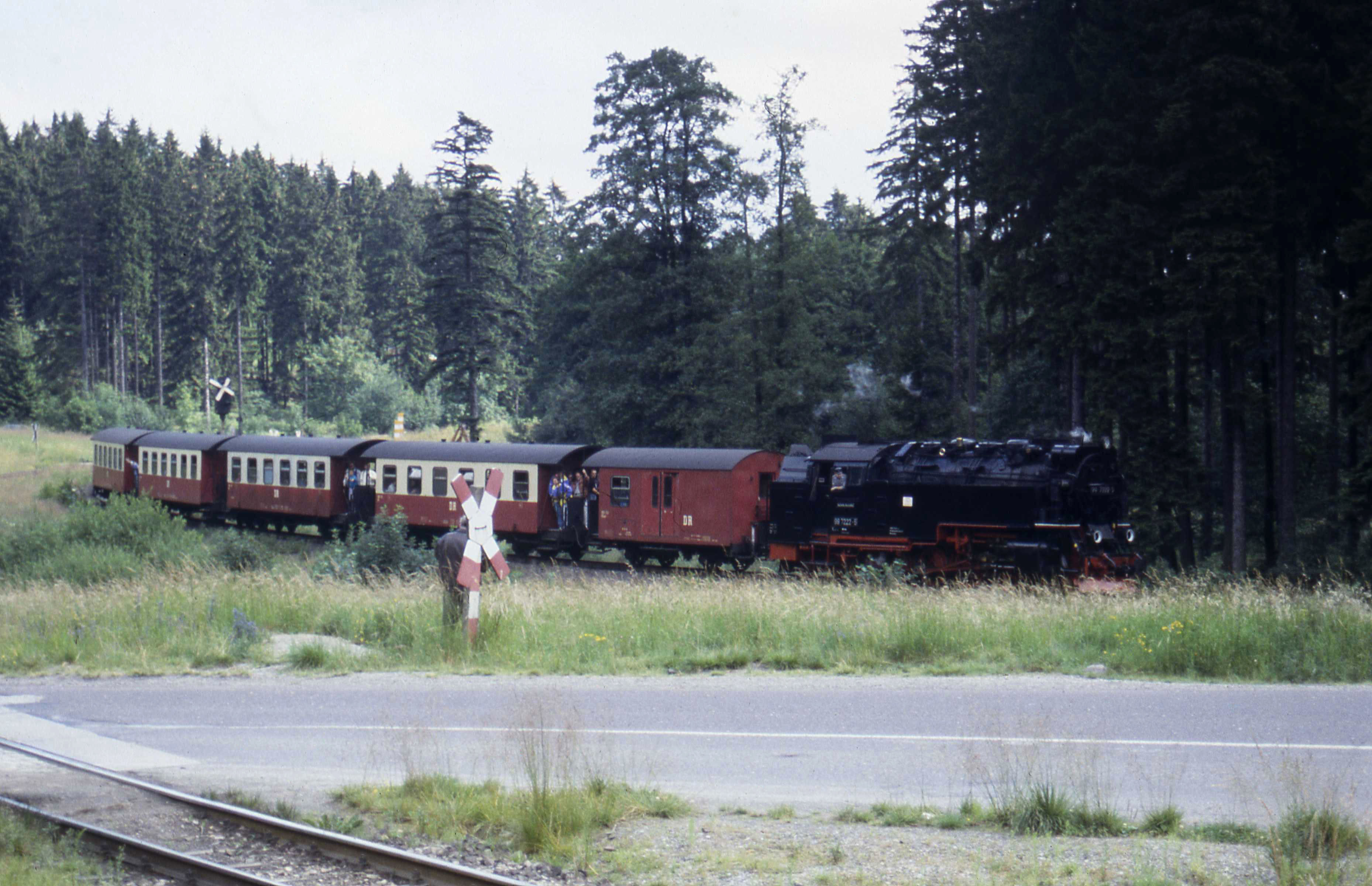 Binnenkomende stoomtrein van de Brockenbahn in Drei Annen Hohne. Het bedrijf was nog volop in stoomexploitatie.